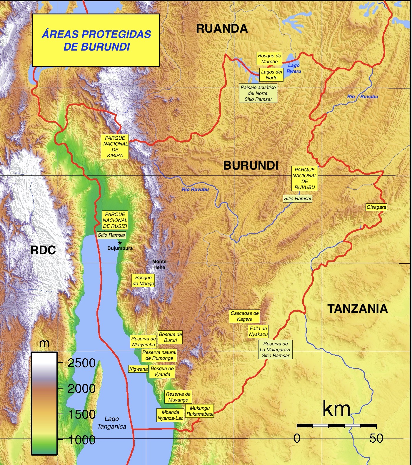 Mapa topográfico de Burundi Created with GMT from public domain SRTM data, con áreas protegidas añadidas